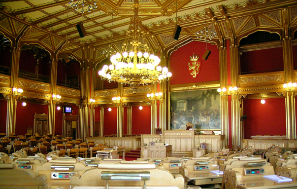 Norwegian parliament (Stortinget), Oslo.